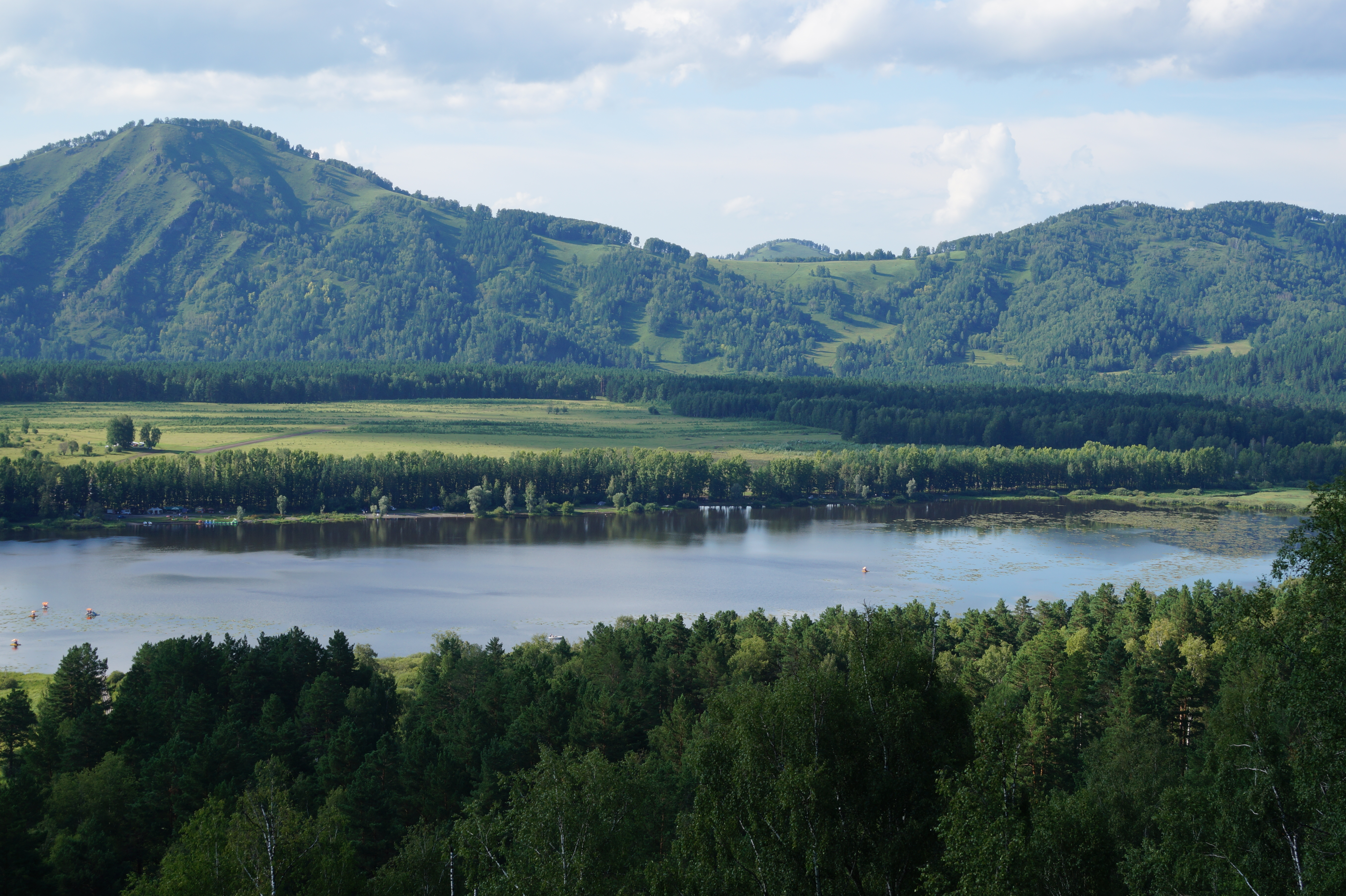 Озеро Манжерокское: Западный склон хр. Иолго, на правом берегу р. Катунь в 1,75 км от русла, 0,5 км северо-восточнее от с.Озерное. Абсолютная отметка: 373,2 м,Озерное,Майминский район, Алтай This image is related to the protected area of Russia number 0410013